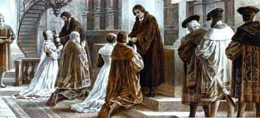 Hermann Wislicenus: Die Fürsten des Schmalkaldischen Bundes empfangen das Abendmahl unter beiden Gestalten. Historiengemälde (Grisaille) aus dem Bilderzyklus des Kaisersaals in Goslar, um 1880